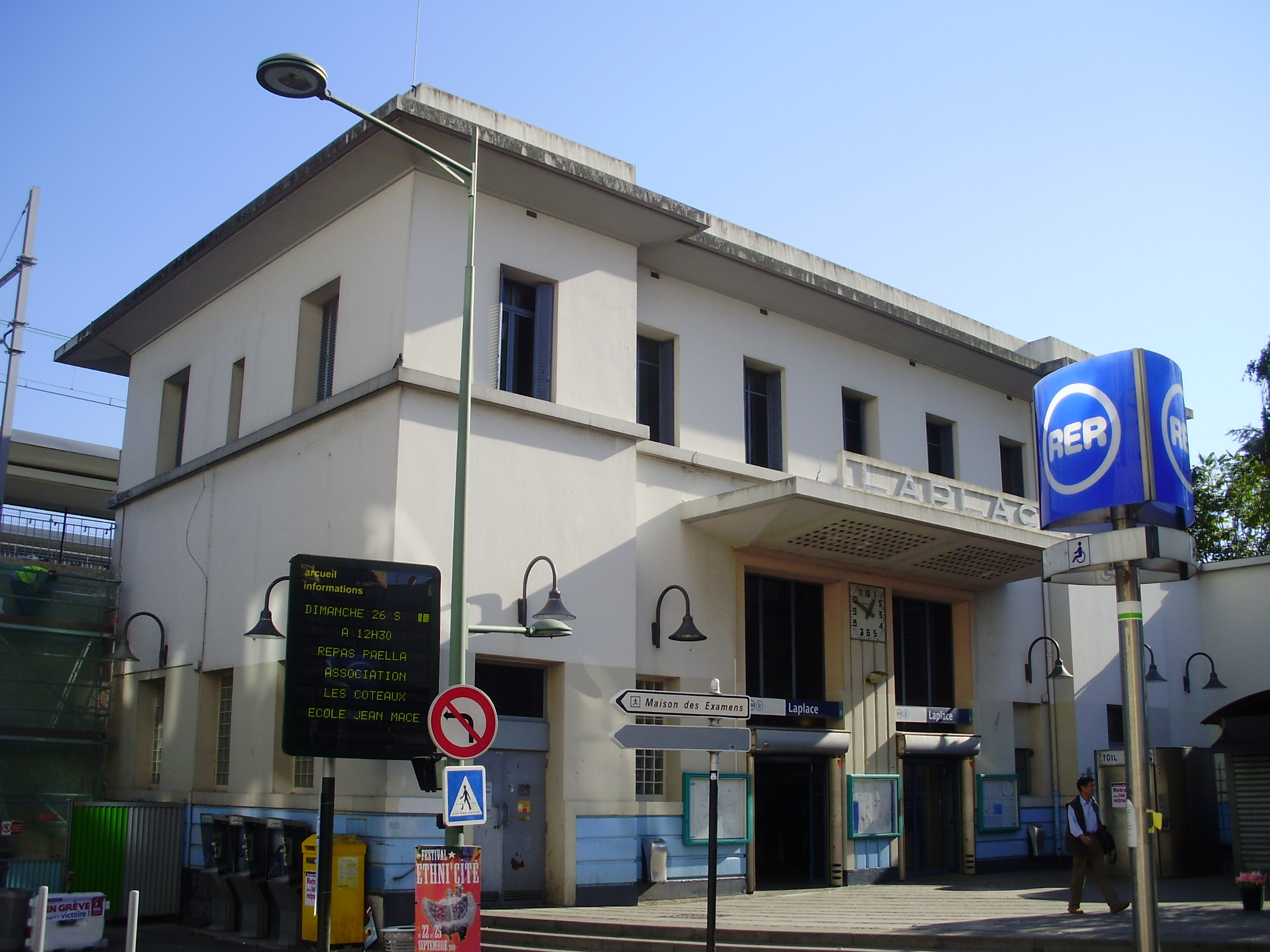 Gare de Laplace, à Arcueil, Val-de-Marne, France (bâtiment voyageurs)